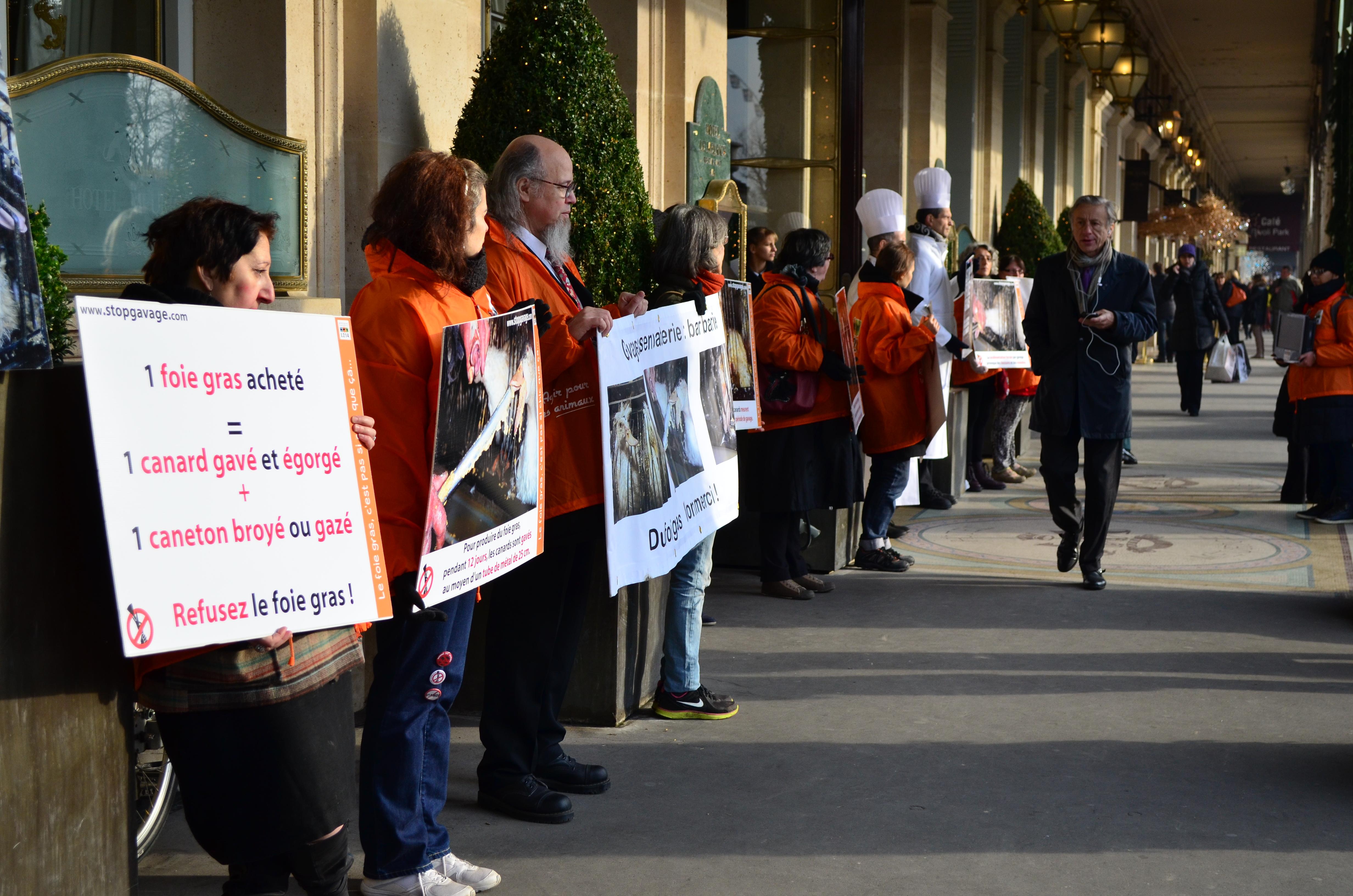 Le jeudi 12 décembre, des militants de L214 Ethique et animaux ont manifesté devant l'hôtel Meurice pour sensibiliser à la souffrance animale engendrée par la production de foie gras, et interpeller le chef du Meurice, Alain Ducasse, sur cette question.